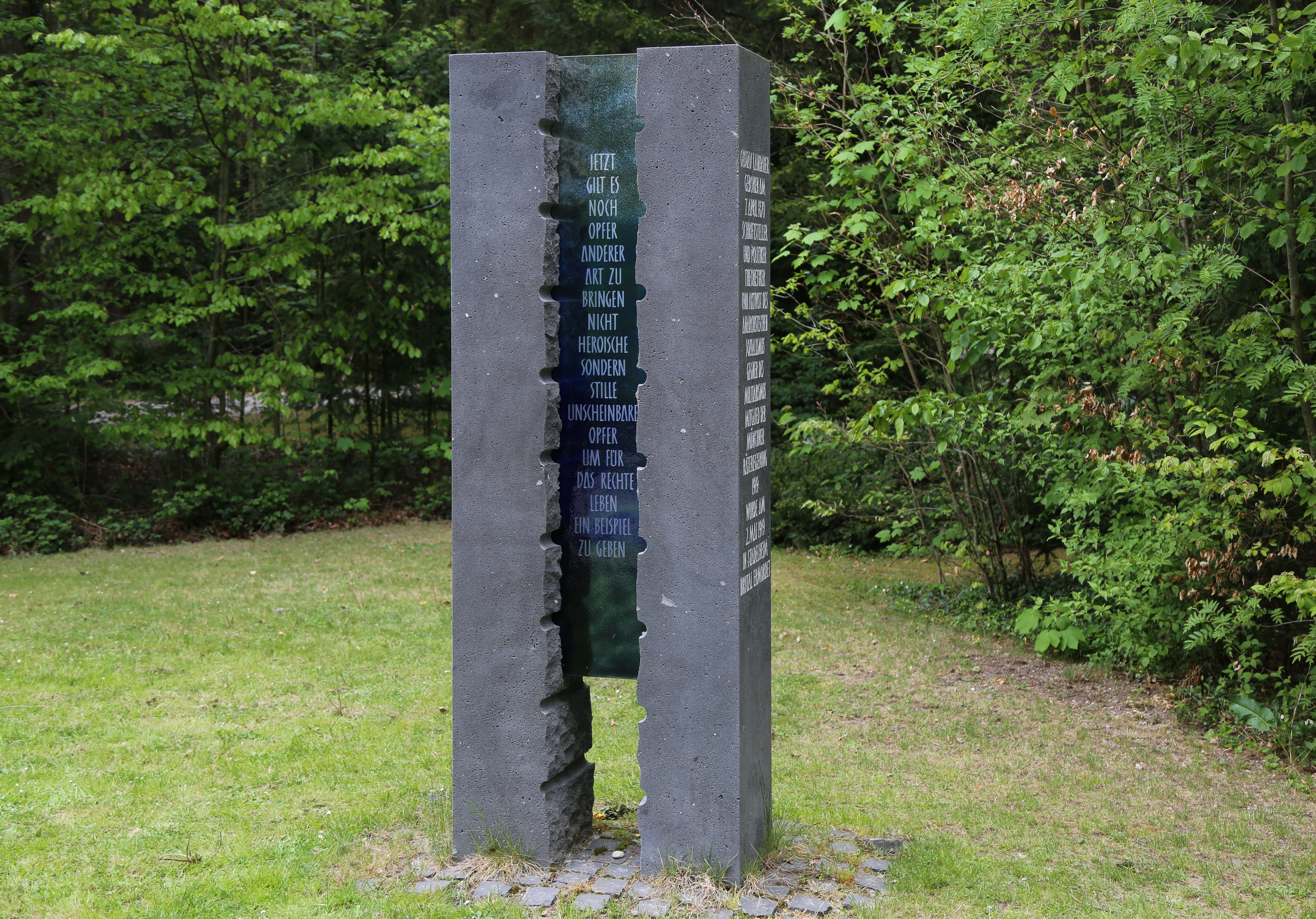 Gedenkstein für Gustav Landauer, Aufgestellt 2017 als Ersatz für das 1933 zerstörte Grabmal.. Waldfriedhof München